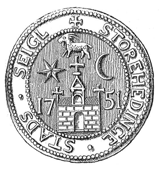 Store Heddinges købstadssegl